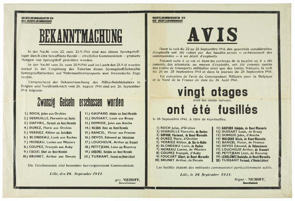 26-09-1941 Vingt otages fusillés 26-09-1941 Orchies Raches Roost-Warendin Waziers Auby Denain Bruay Aniche Fresnes Valenciennes Drocourt Rouvroy Hénin-Liétard